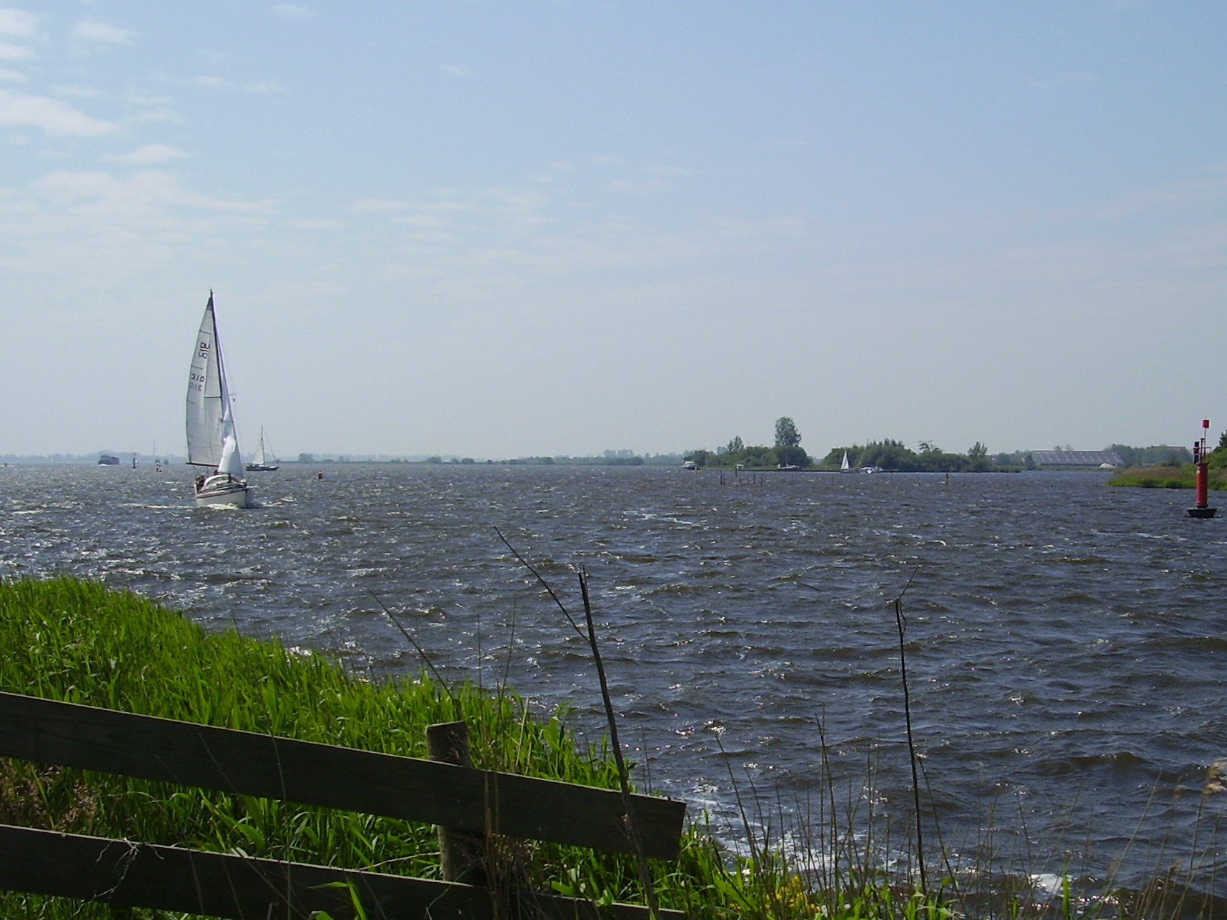 De Groote Brekken in provincie Friesland, Nederland